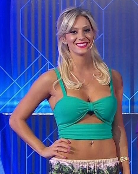 Noelia Marzol durante un programa de La Nave de Marley televisado por Telefe en 2014.